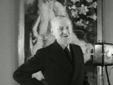 Schilder Kees van Dongen in 1938.